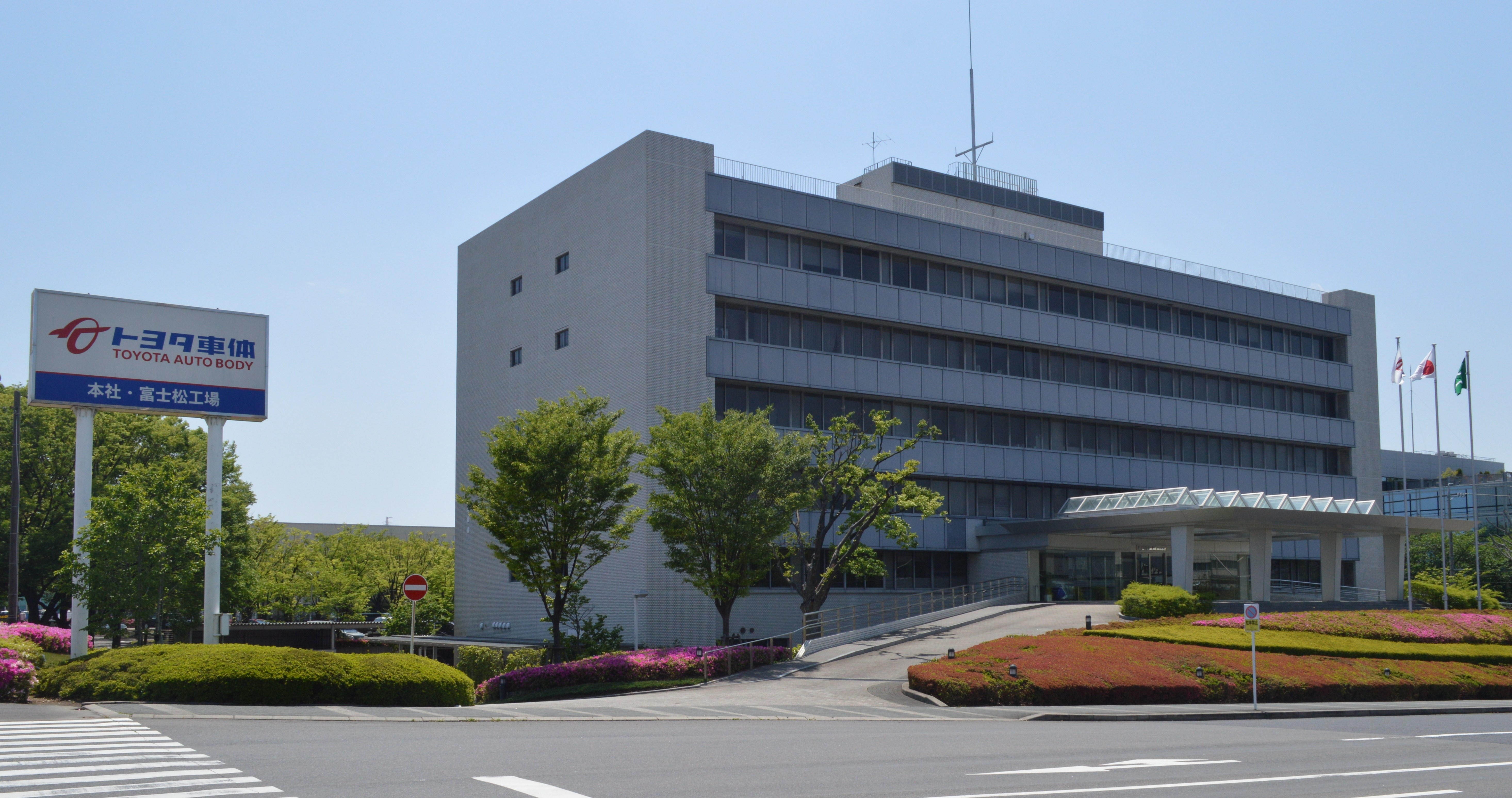 トヨタ車体本社、愛知県刈谷市